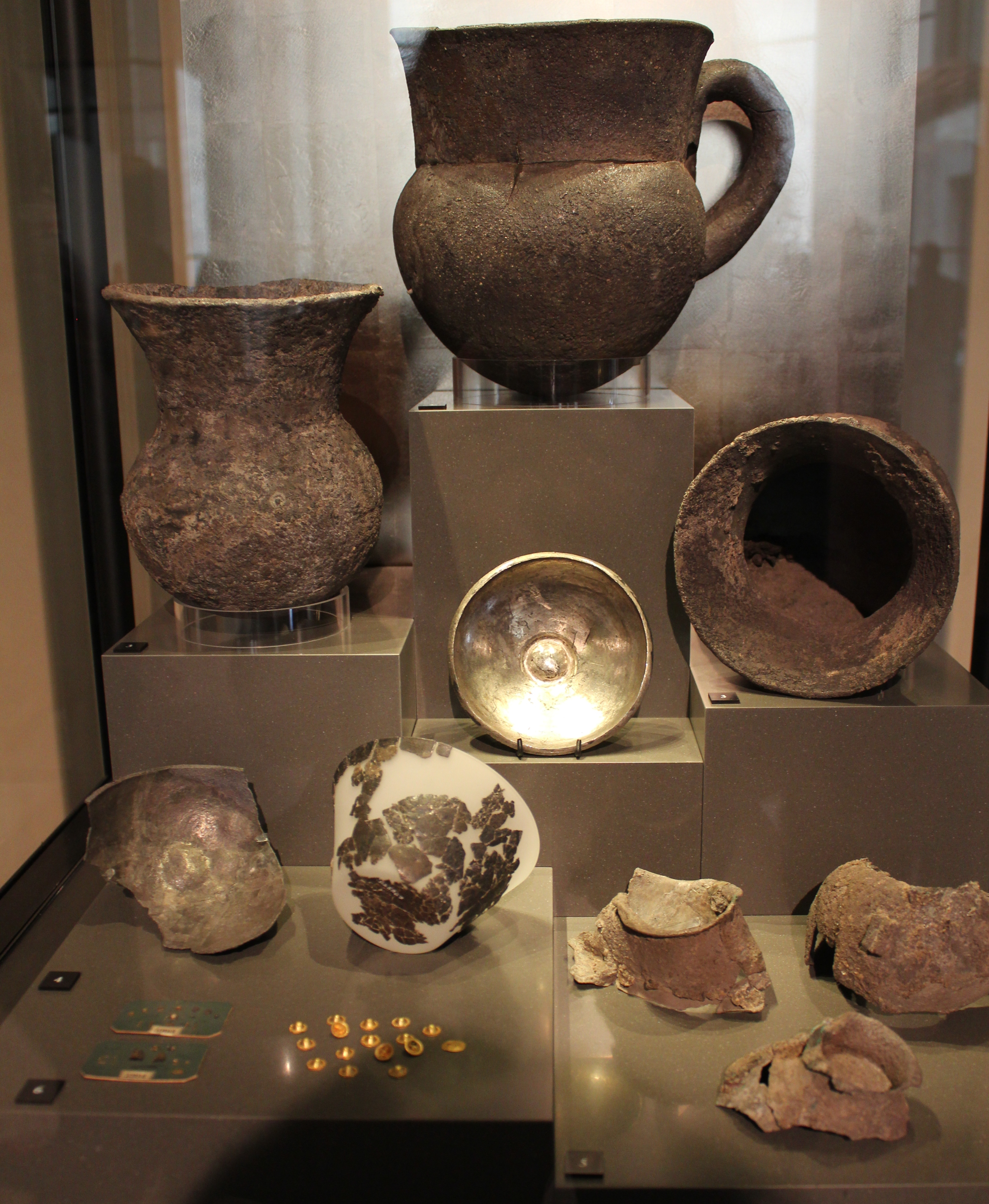 Silbervasen aus dem Schatz des Priamos im Neuen Museum Berlin